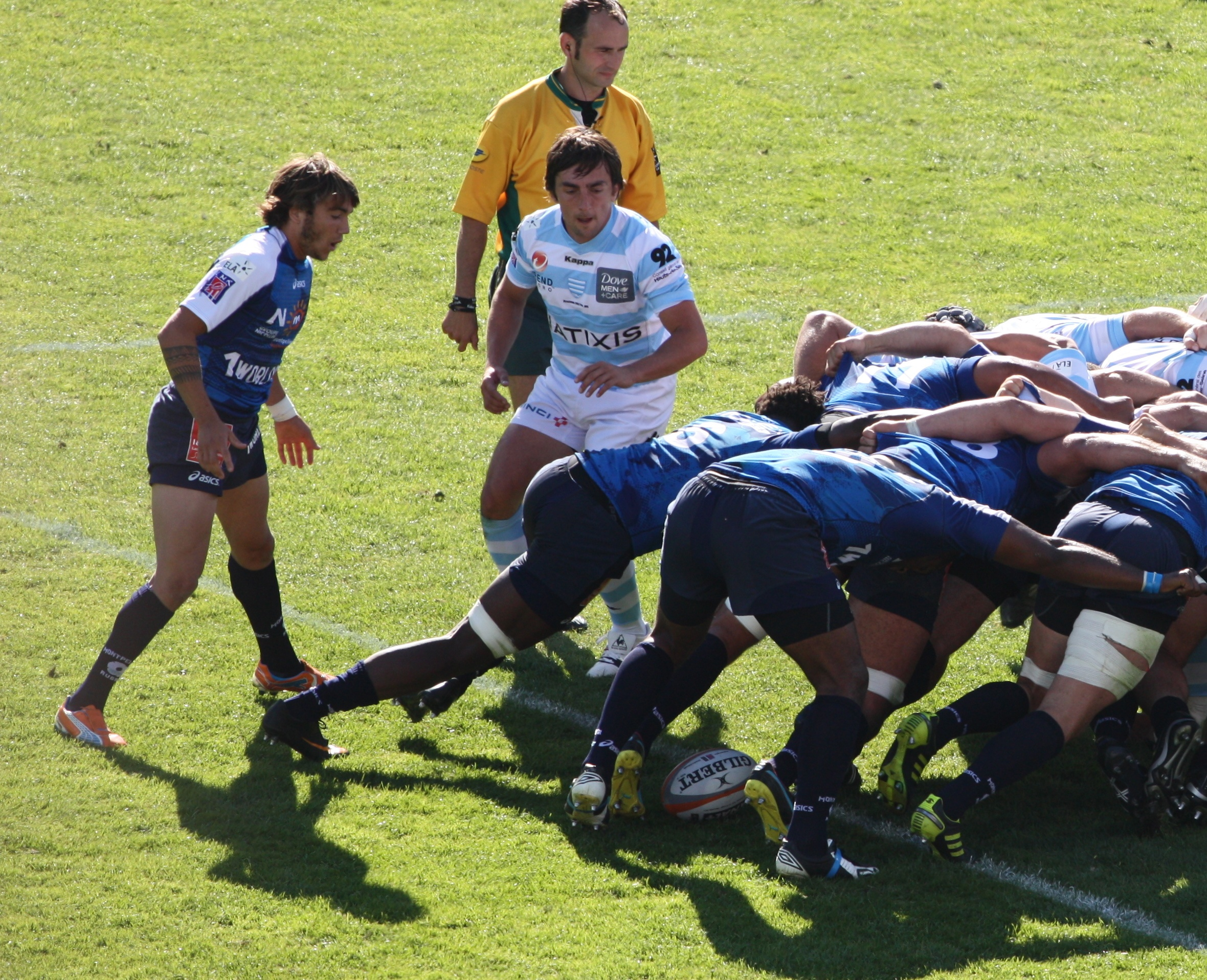 Demi-finale du Top 14 2010-2011 Racing Métro 92 - Montpellier HR au Stade vélodrome de Marseille